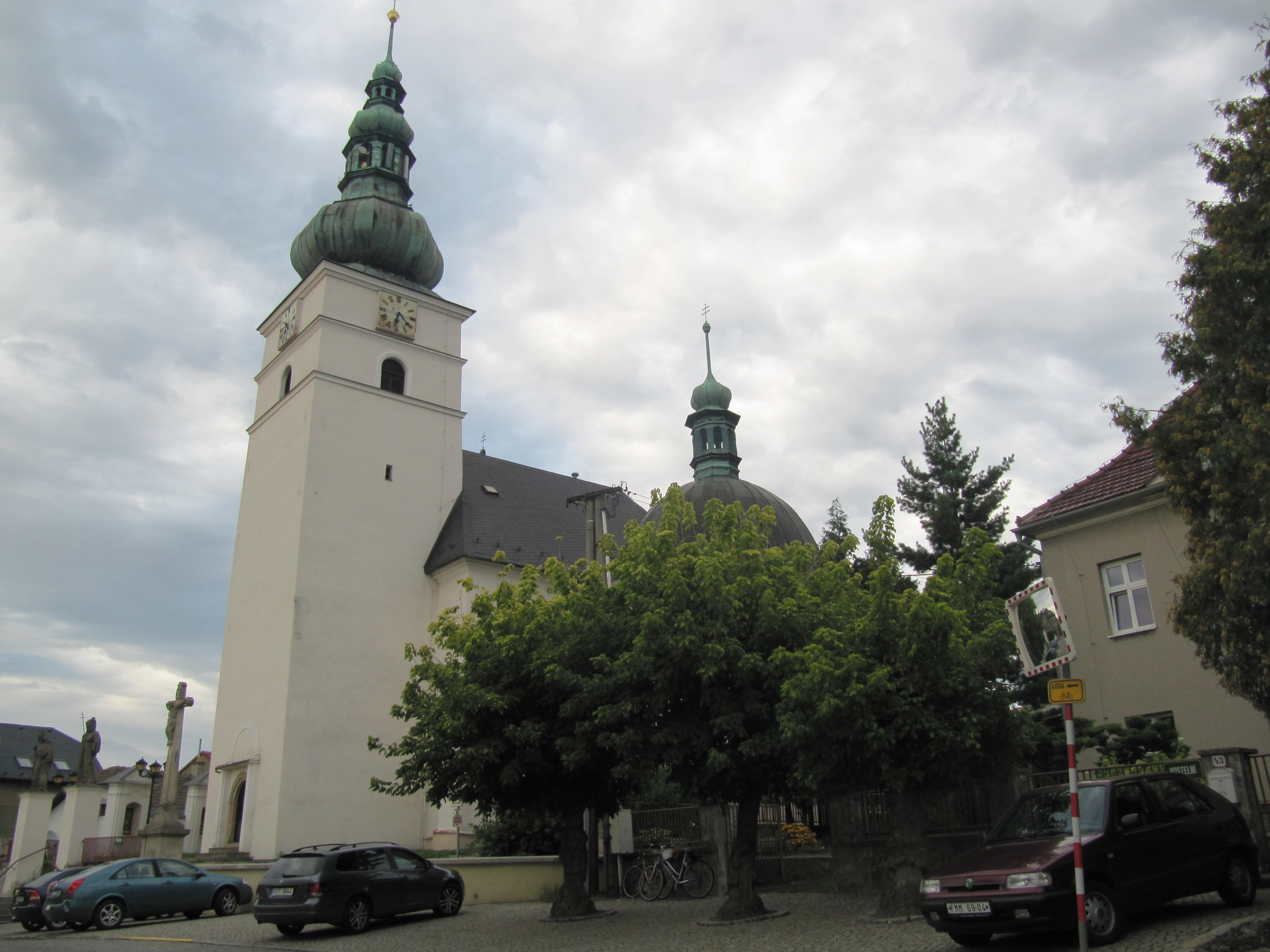 Brušperk